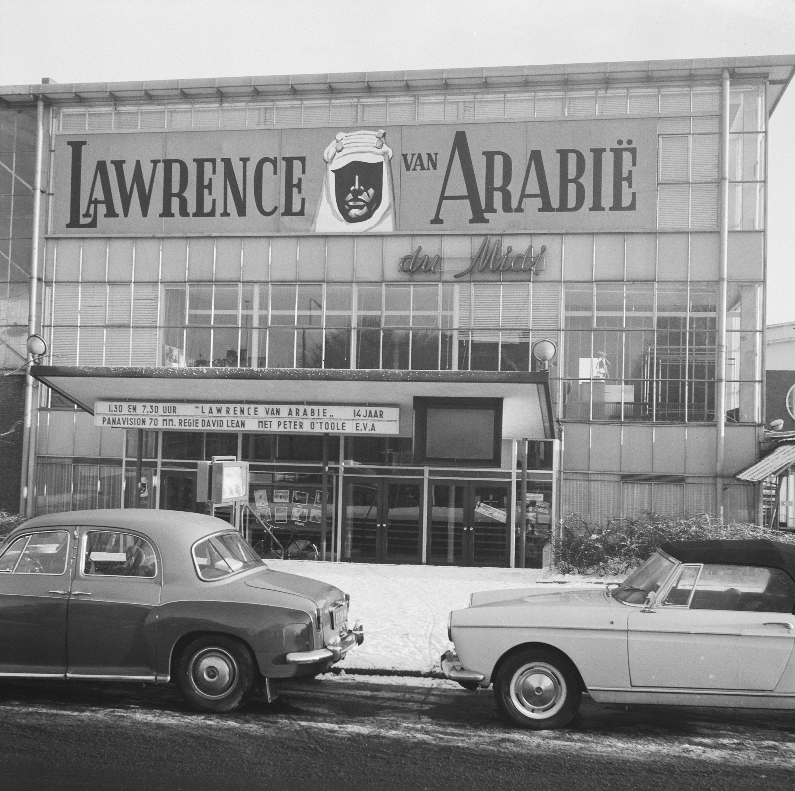 Collectie / Archief : Fotocollectie Anefo Reportage / Serie : [ onbekend ] Beschrijving : Cinema Du Midi. Film "Lawrence of Arabia" Datum : 20 december 1963 Locatie : Amsterdam, Noord-Holland Trefwoorden : bioscopen, gebouwen Instellingsnaam : Du Midi Fotograaf : Nijs, Jac. de / Anefo Auteursrechthebbende : Nationaal Archief Materiaalsoort : Negatief (zwart/wit) Nummer archiefinventaris : bekijk toegang 2.24.01.03 Bestanddeelnummer : 915-8670